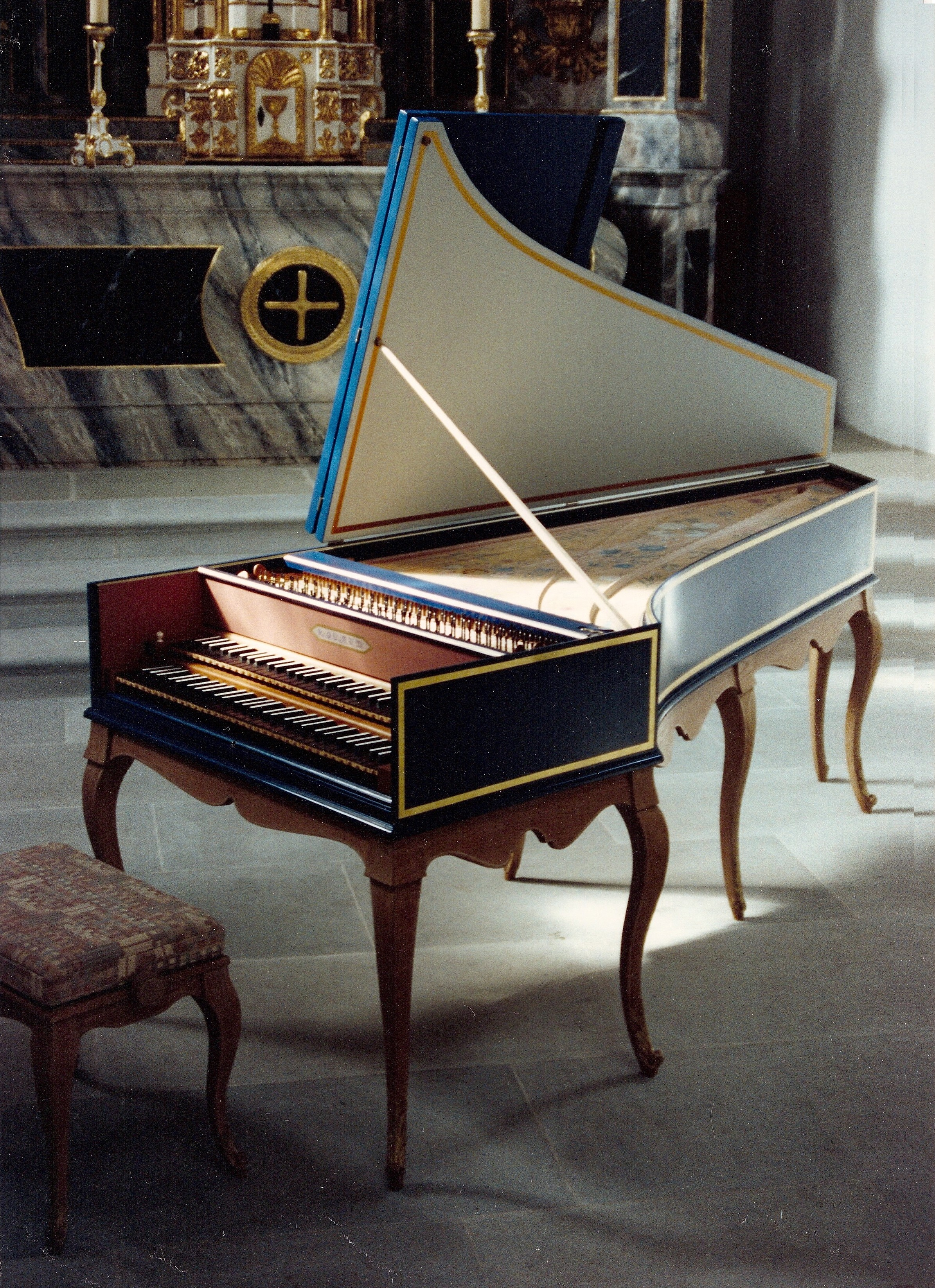 Clavecin construit par Jean-Paul Rouaud d'après Nicolas Dumont 1707